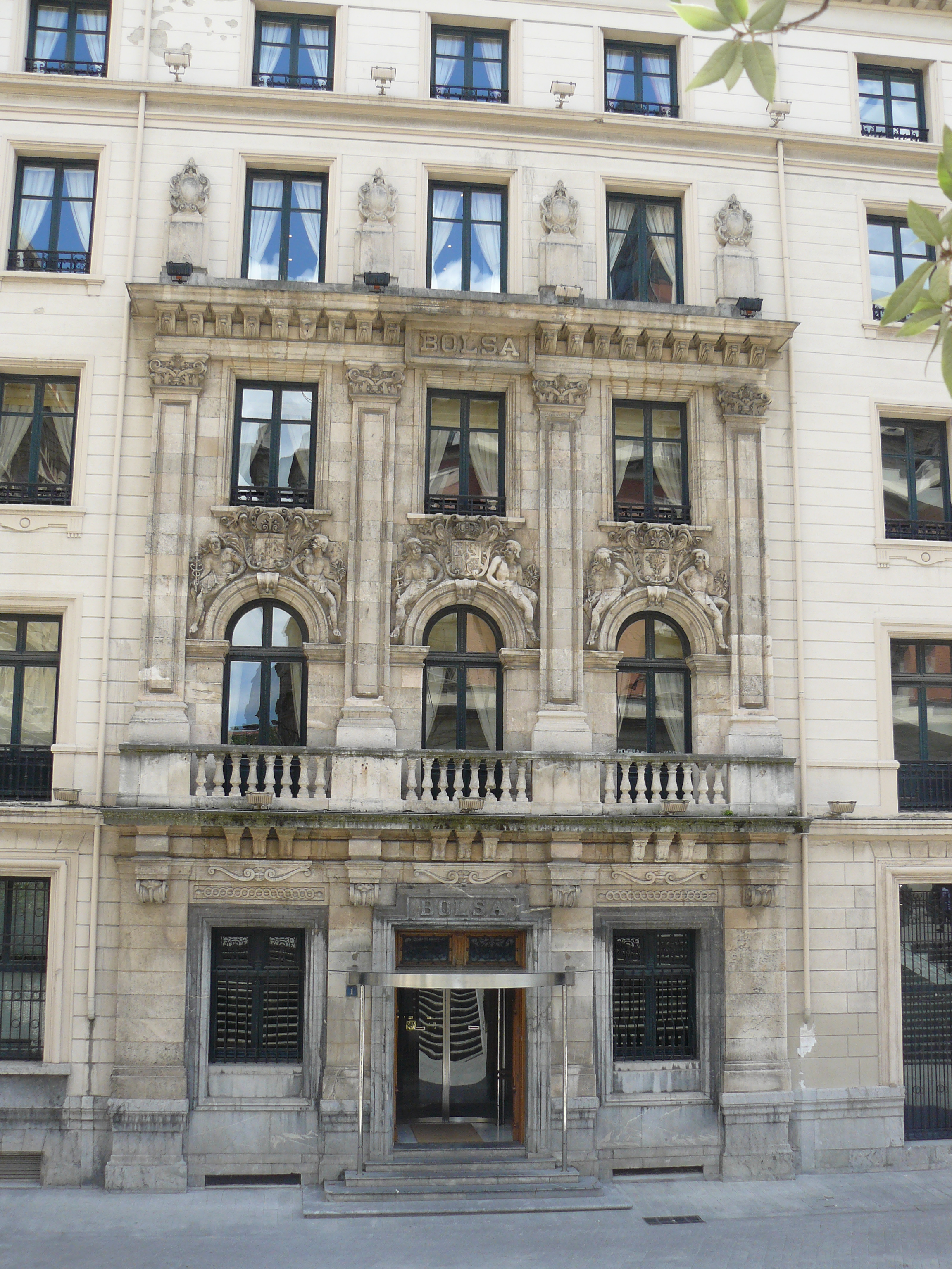 Edificio de la Bolsa de Bilbao, España.